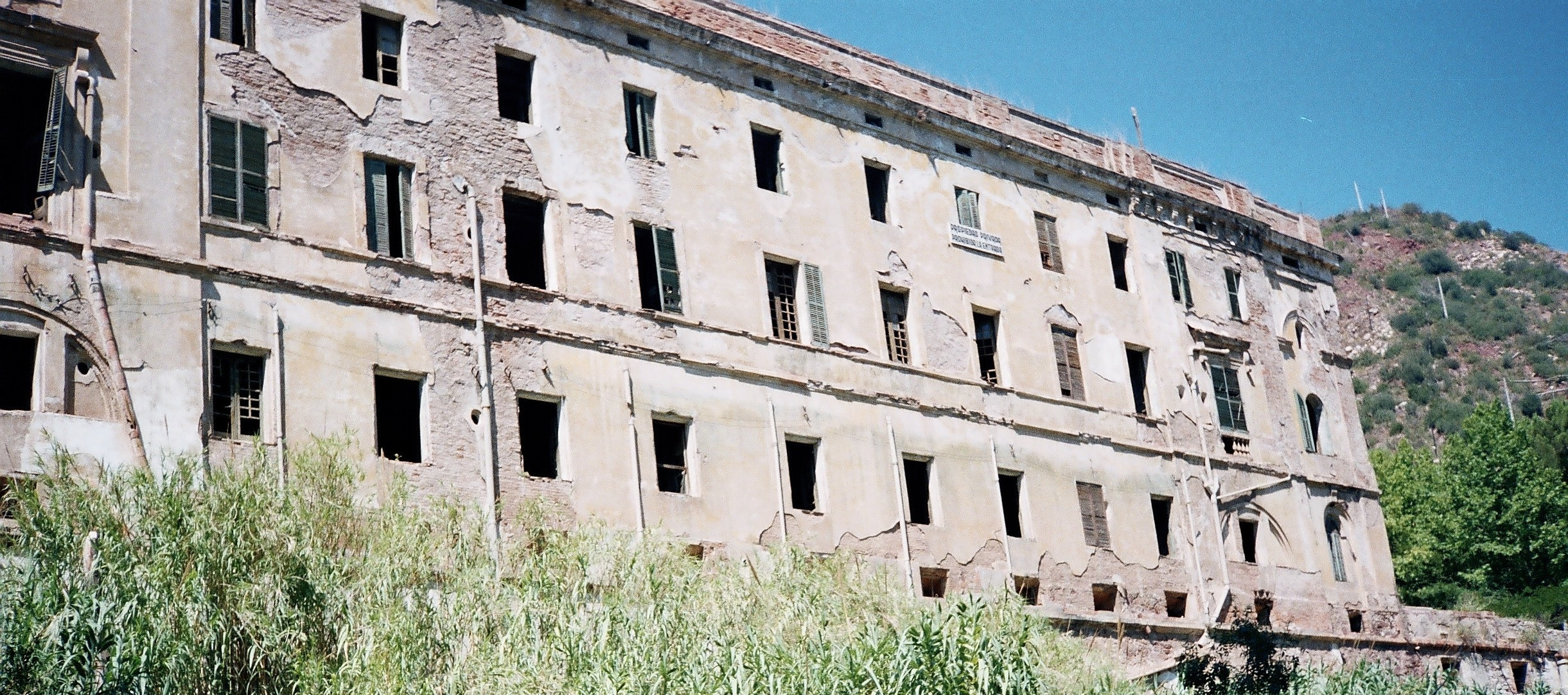 Façana lateral de l'edifici principal d'habitacions i banys de La Puda de Montserrat